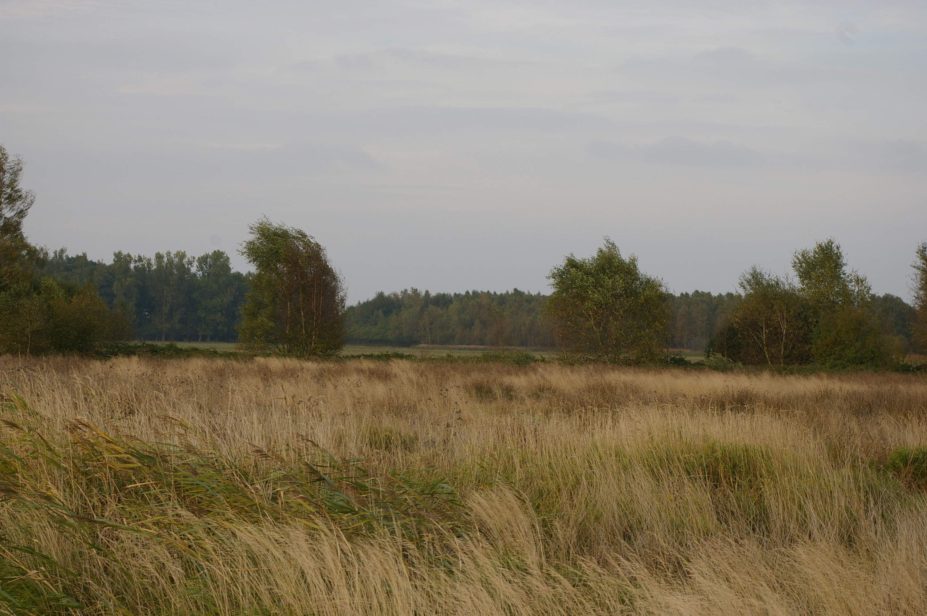 Das Siedener Moor bei Maasen